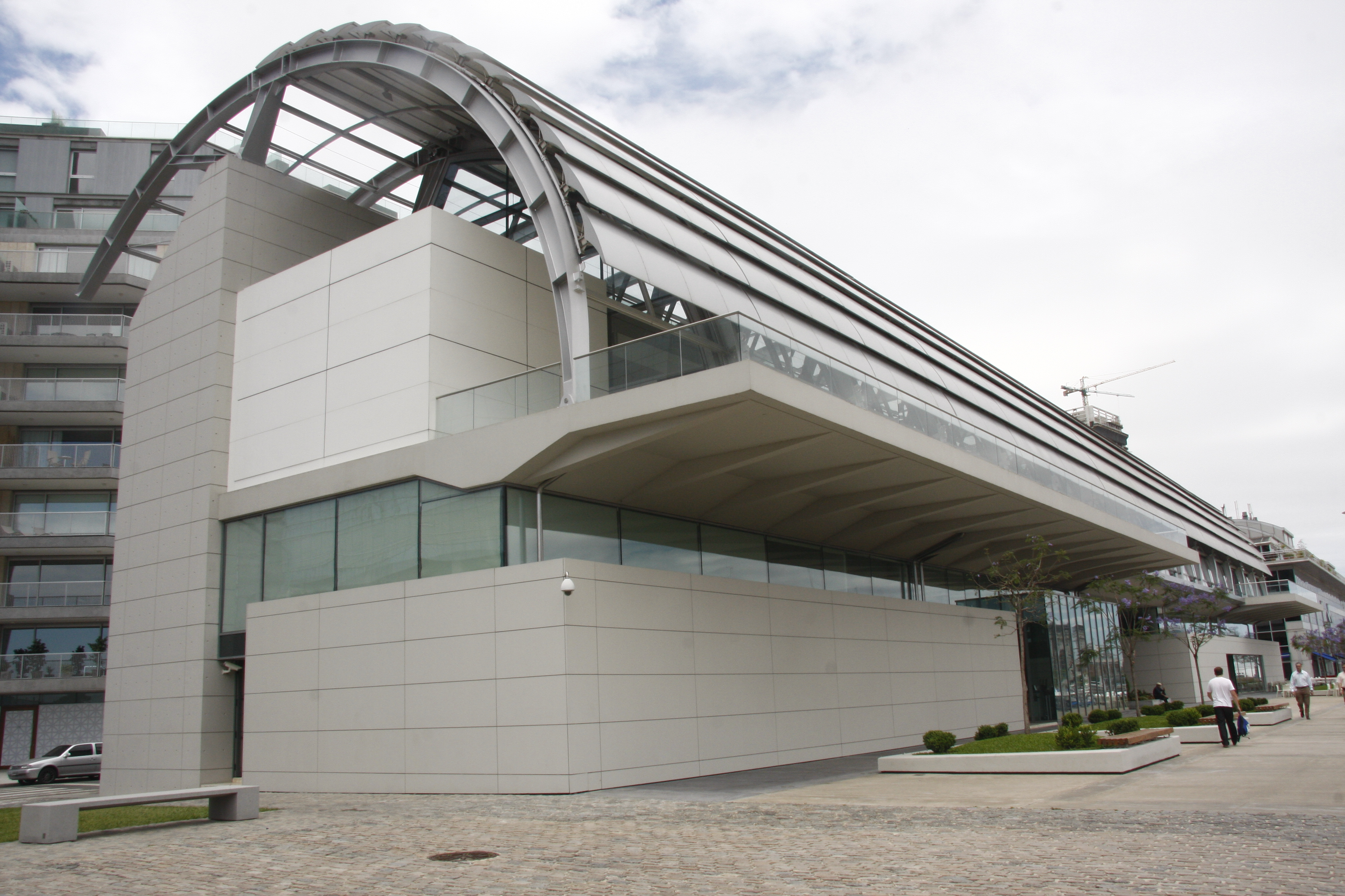 Colección de Arte Amalia Lacroze de Fortabat, Puerto Madero, Ciudad Autónoma de Buenos Aires.